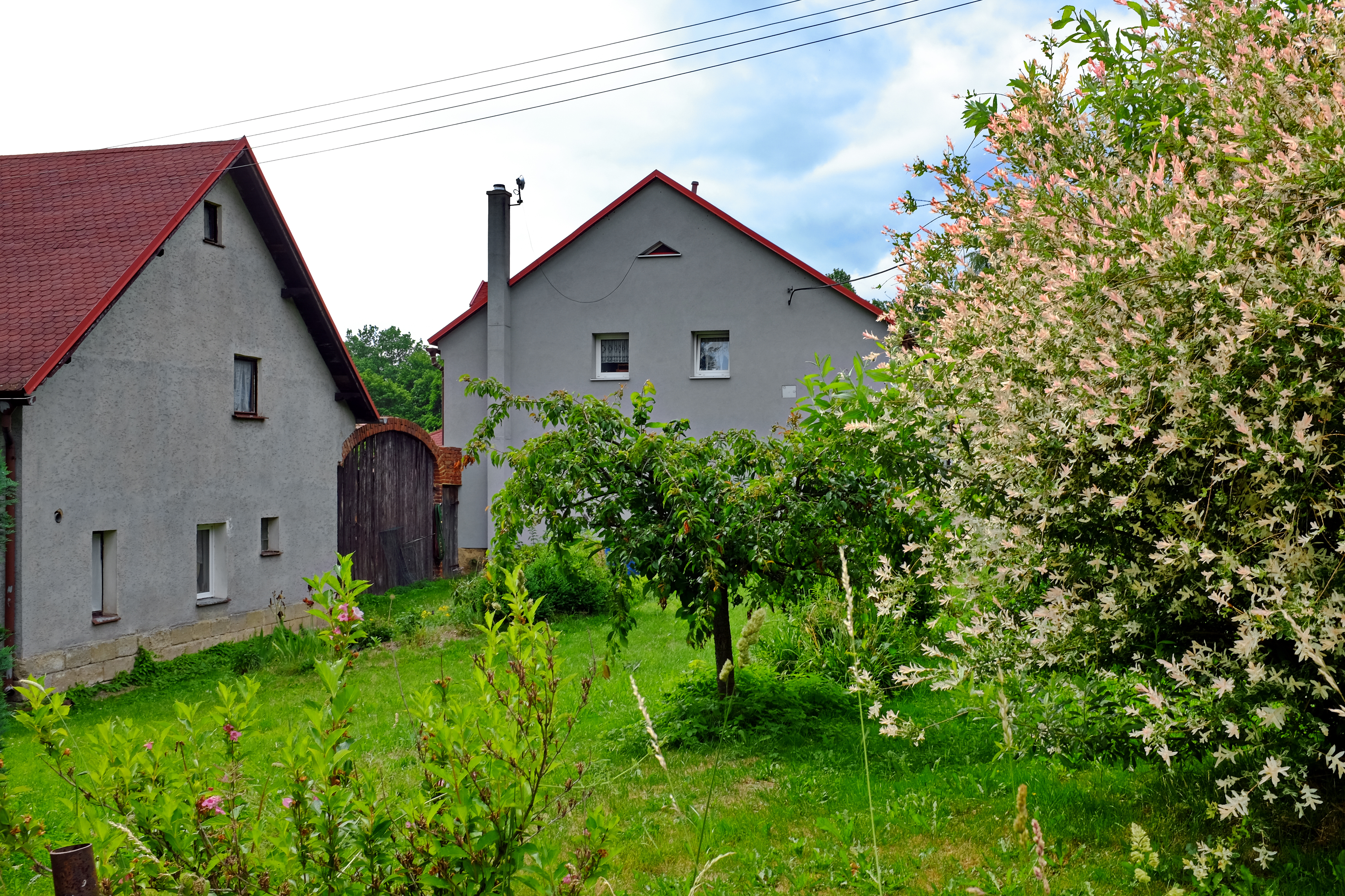 Čižebná, část obce Nový Kostel, okres Cheb